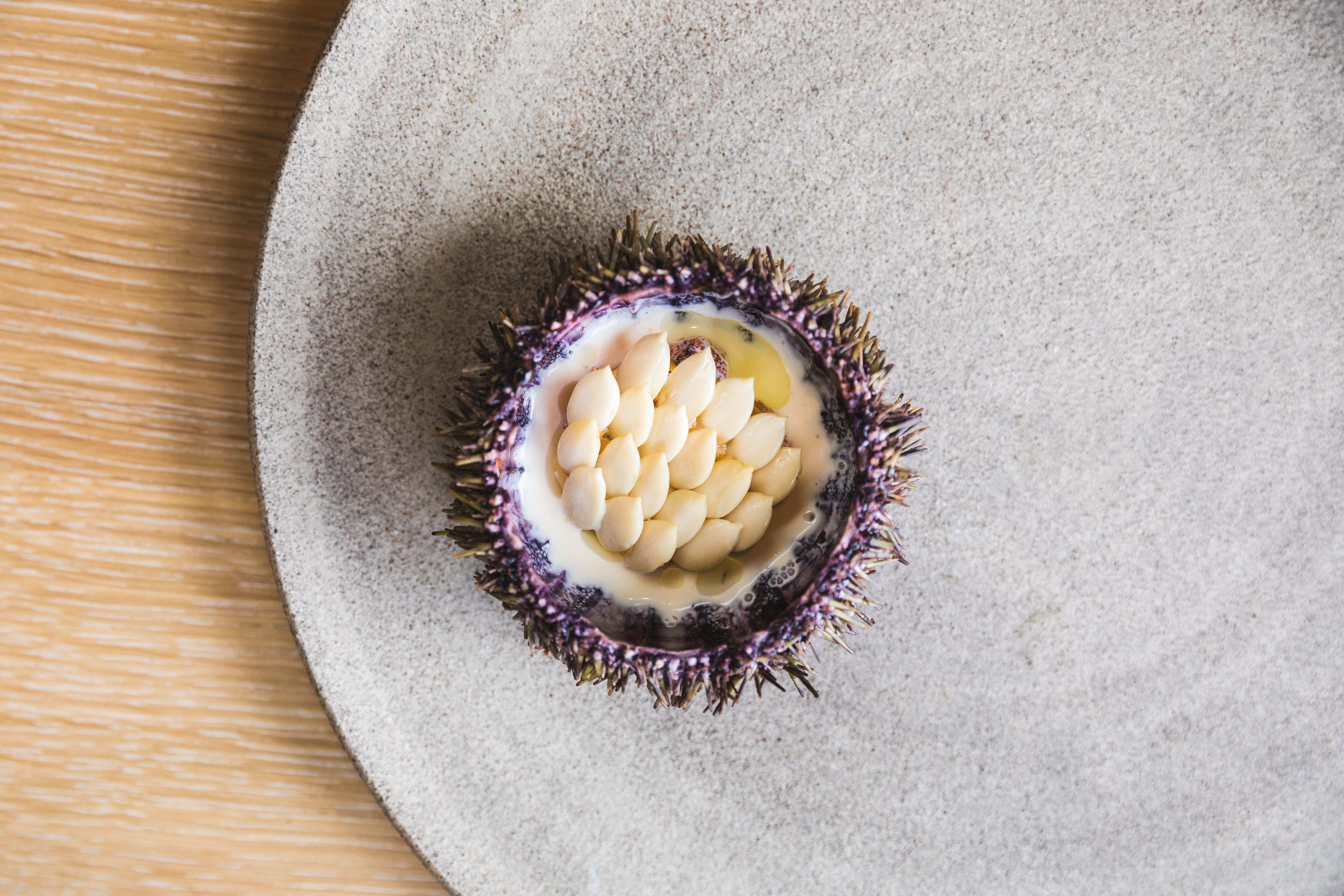 AV4A6275